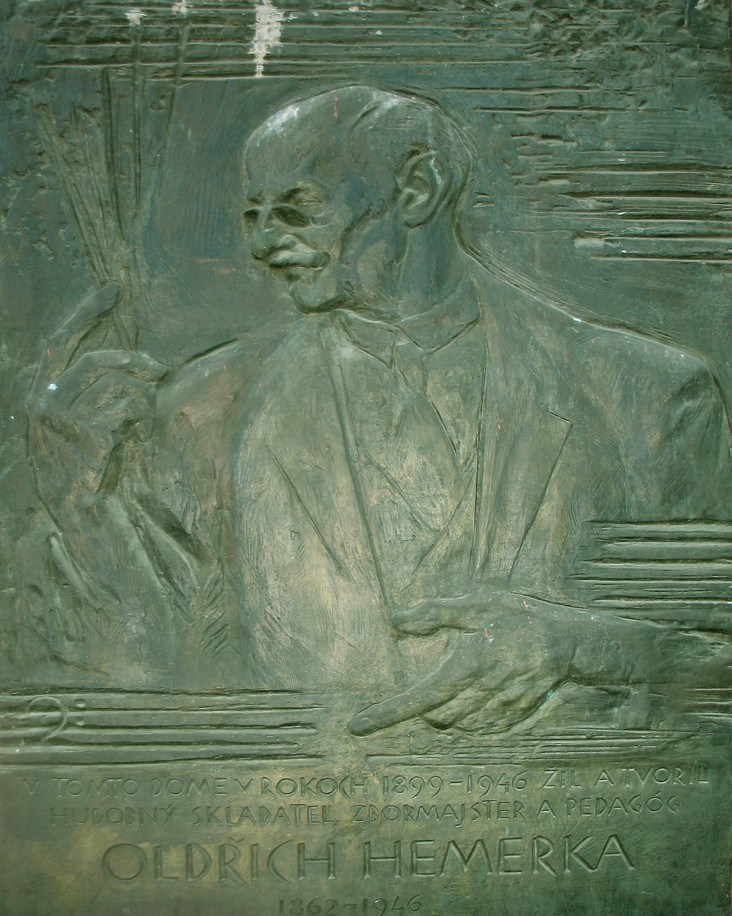 Pamätná tabuľa